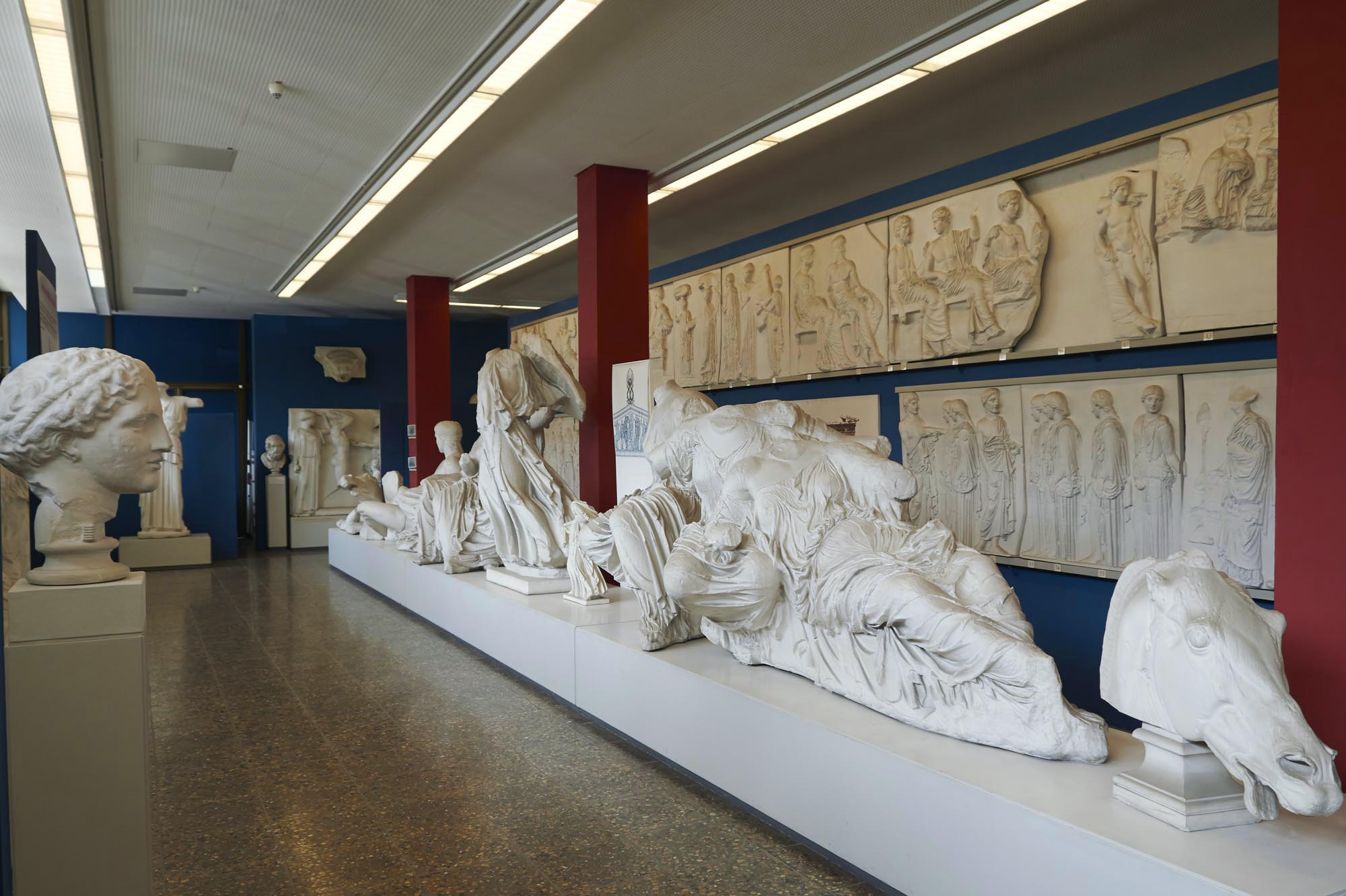 Antikenmuseum der Universität Heidelberg – Abguss-Sammlung, Westsaal. Fotograf: Hubert Vögele